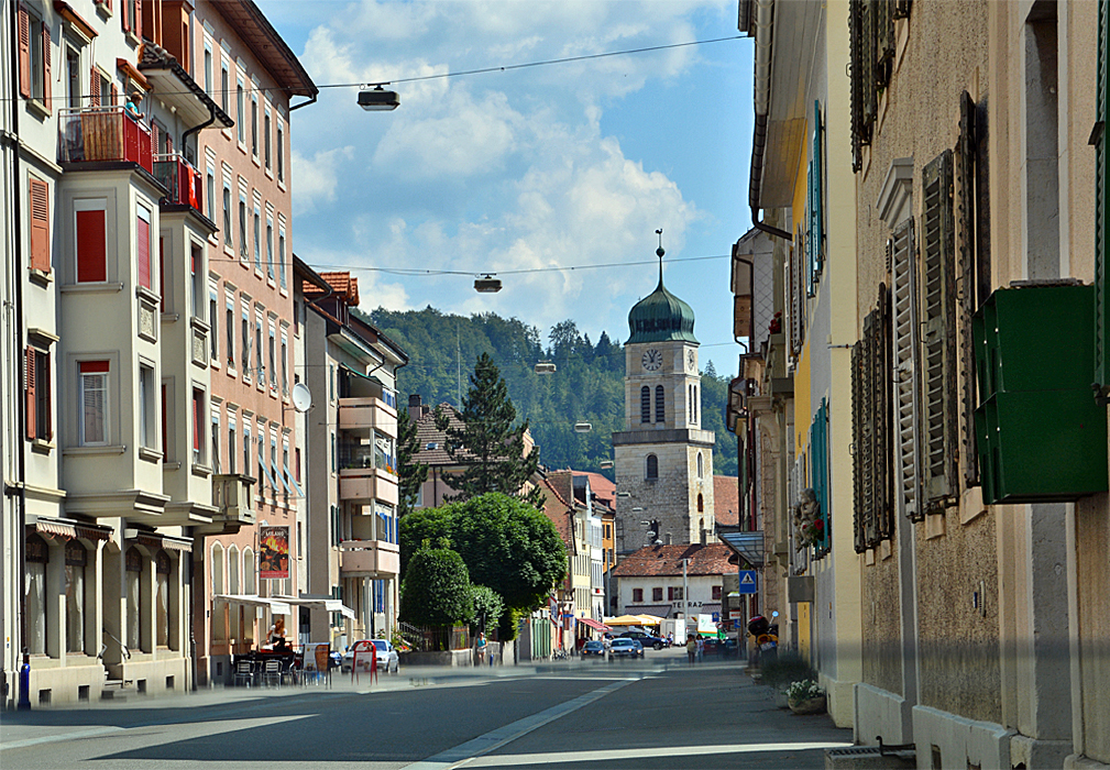 Saint-Imier, Stadtzentrum